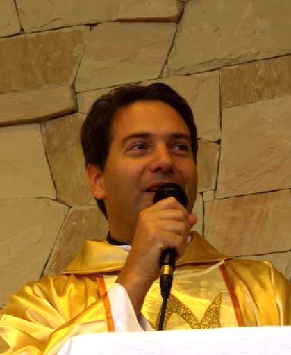 Mislav Hodžić